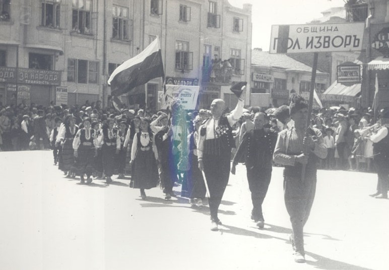 4-ти селскостопански културен и национален събор, 28 - 29 август 1938 г., гр. Варна. Парад на участниците в събора по ул. Княз Борис І. На преден план са представителите на община Голям Извор.